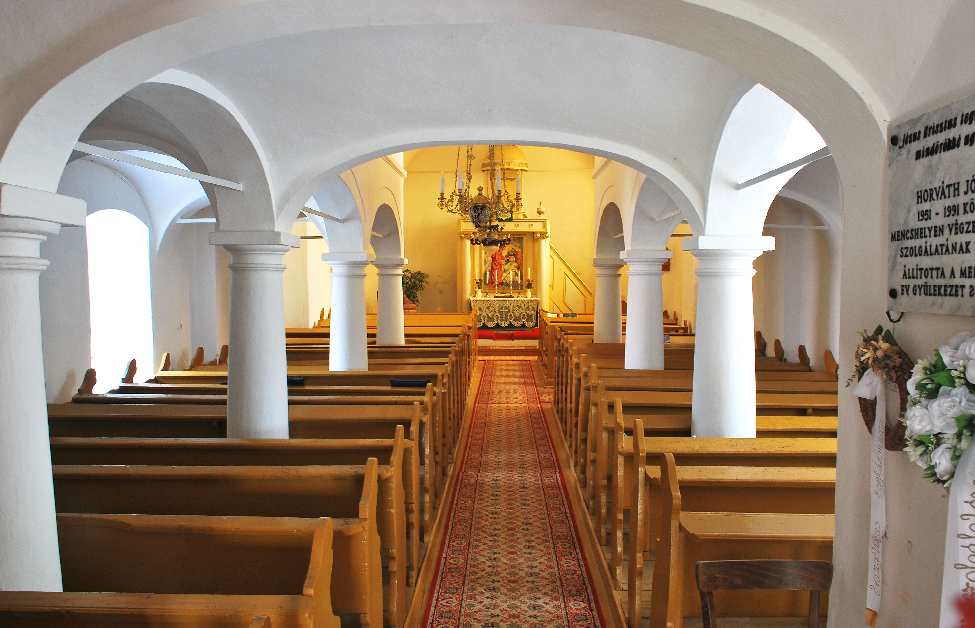 Mencshelyi evangélikus templom belül (Veszprém megye)